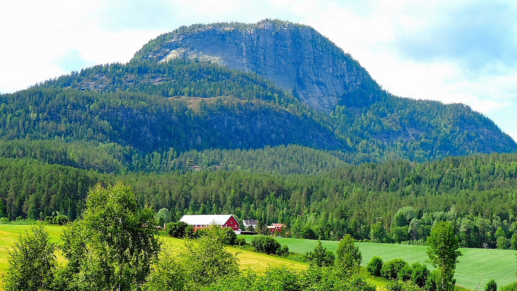 Sigdal, Norway